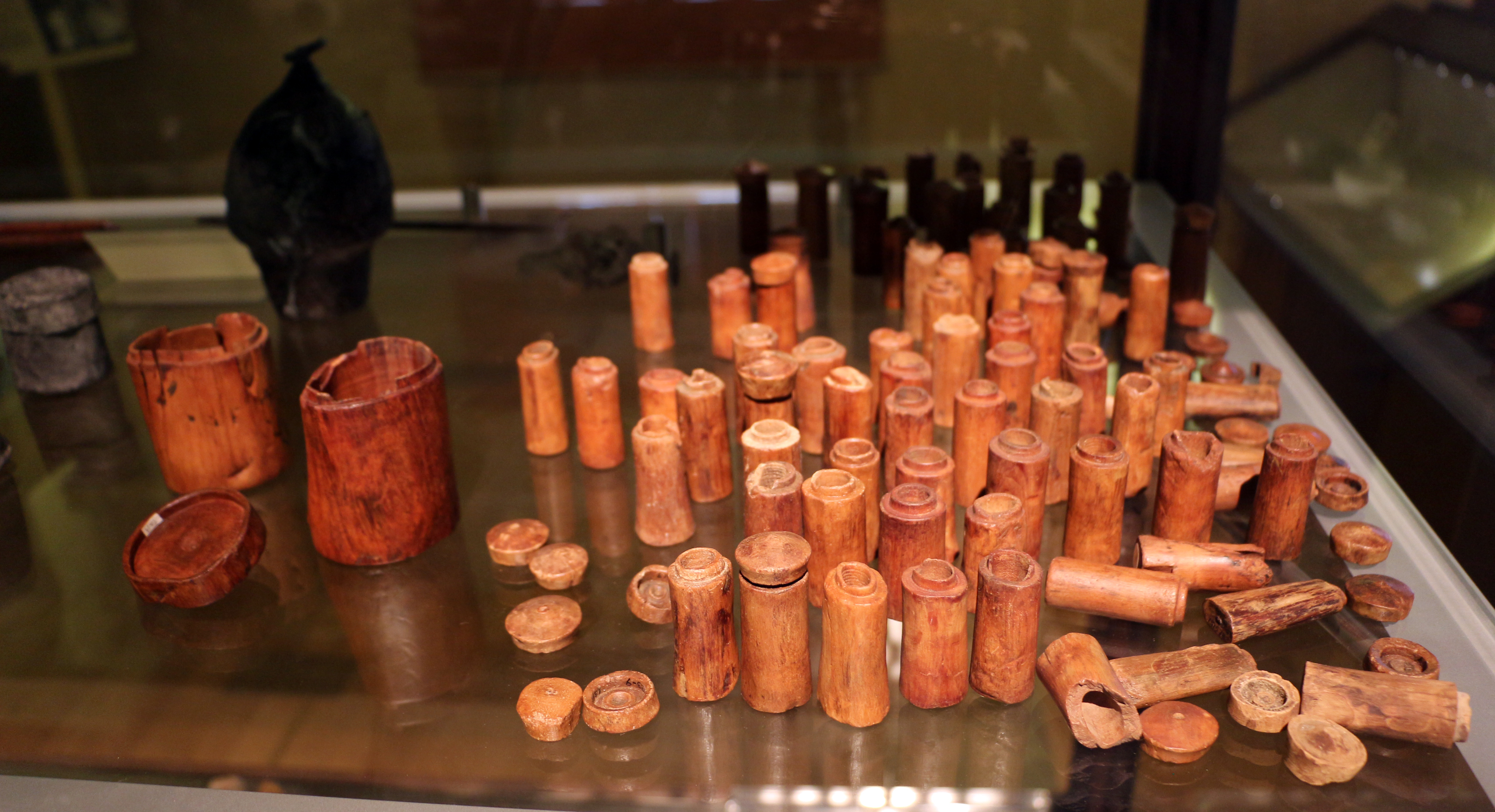 Piccoli contenitori per aromi, in legno di bosso, 110 a.C. circa. Trovati sul Relitto del Pozzino, conservato presso il Museo archeologico del territorio di Populonia a Piombino.